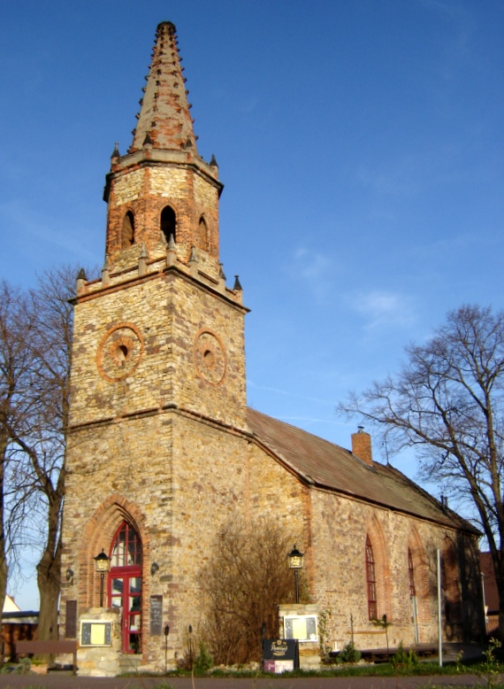 Immanuel-Kirche Magdeburg-Prester